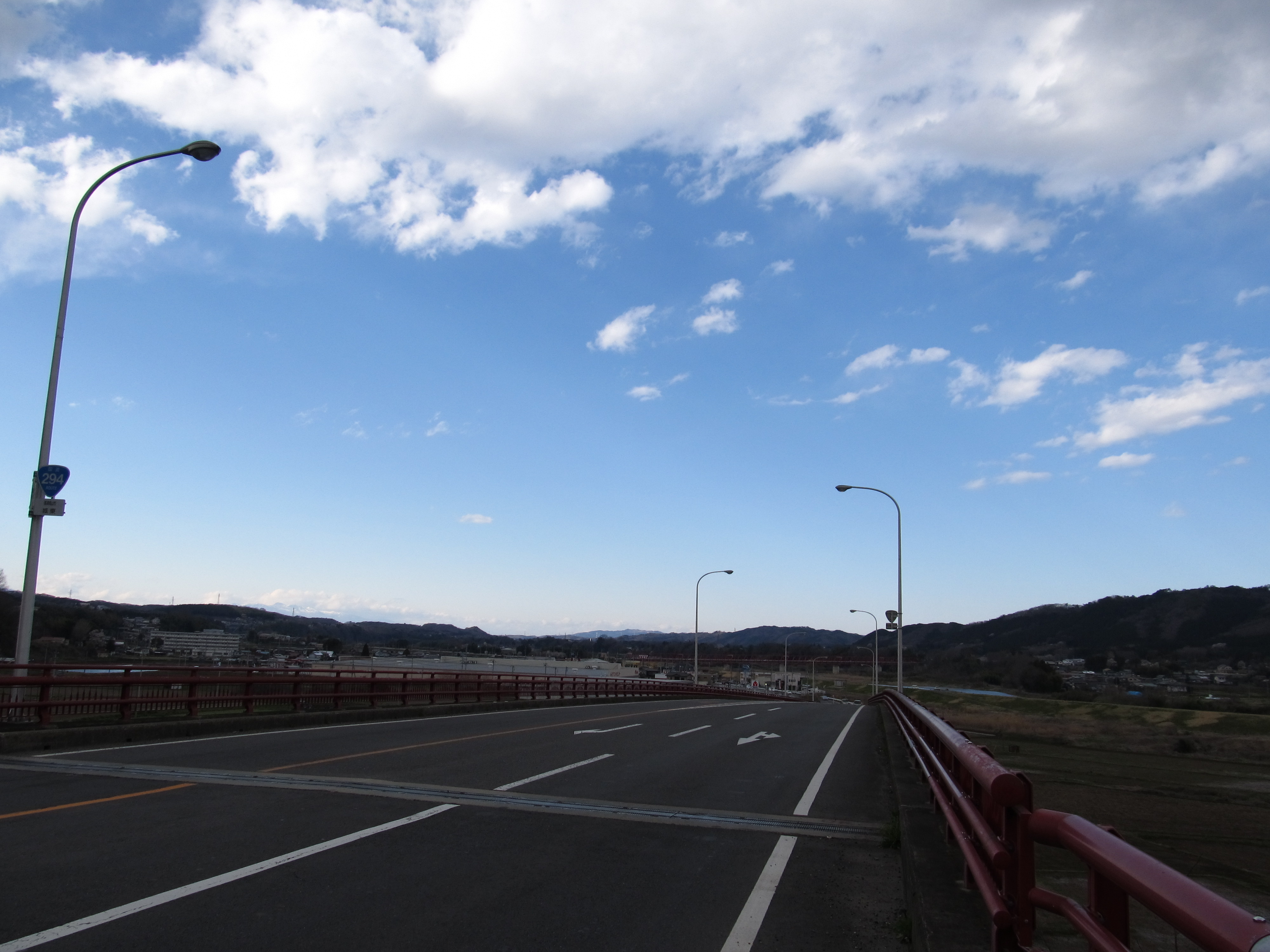 栃木県那須烏山市城東にある国道294号の陸橋。同市で行われる祭りに因んで「山あげ大橋」の愛称がつけられている。